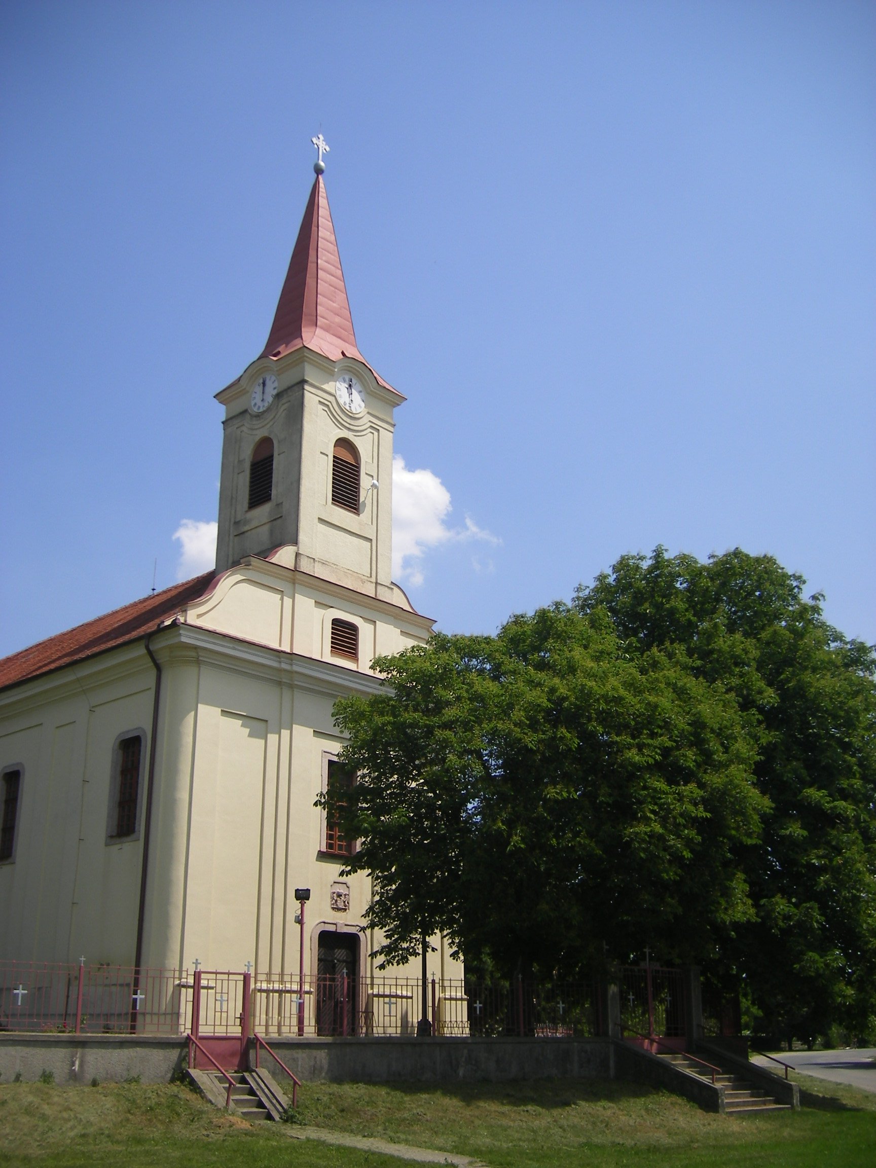 Perbete - Katolikus templom